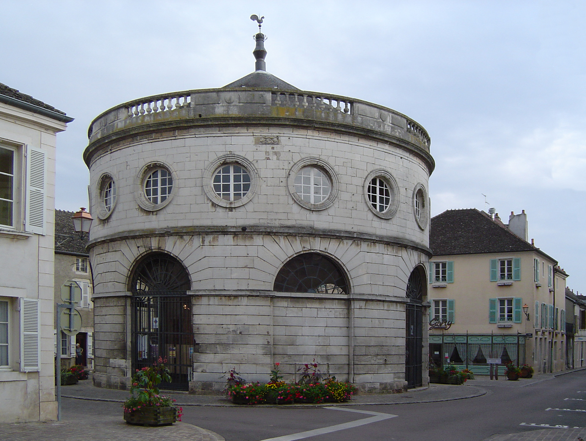 Givry (Saône et loire) Halle ronde